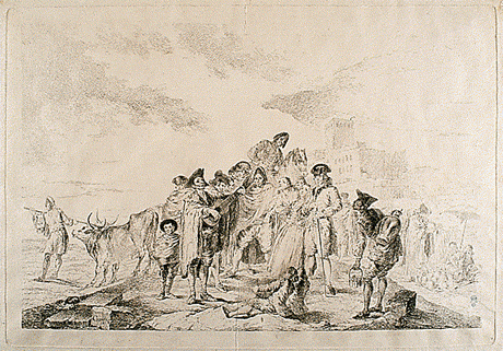 Dibujo preparatorio